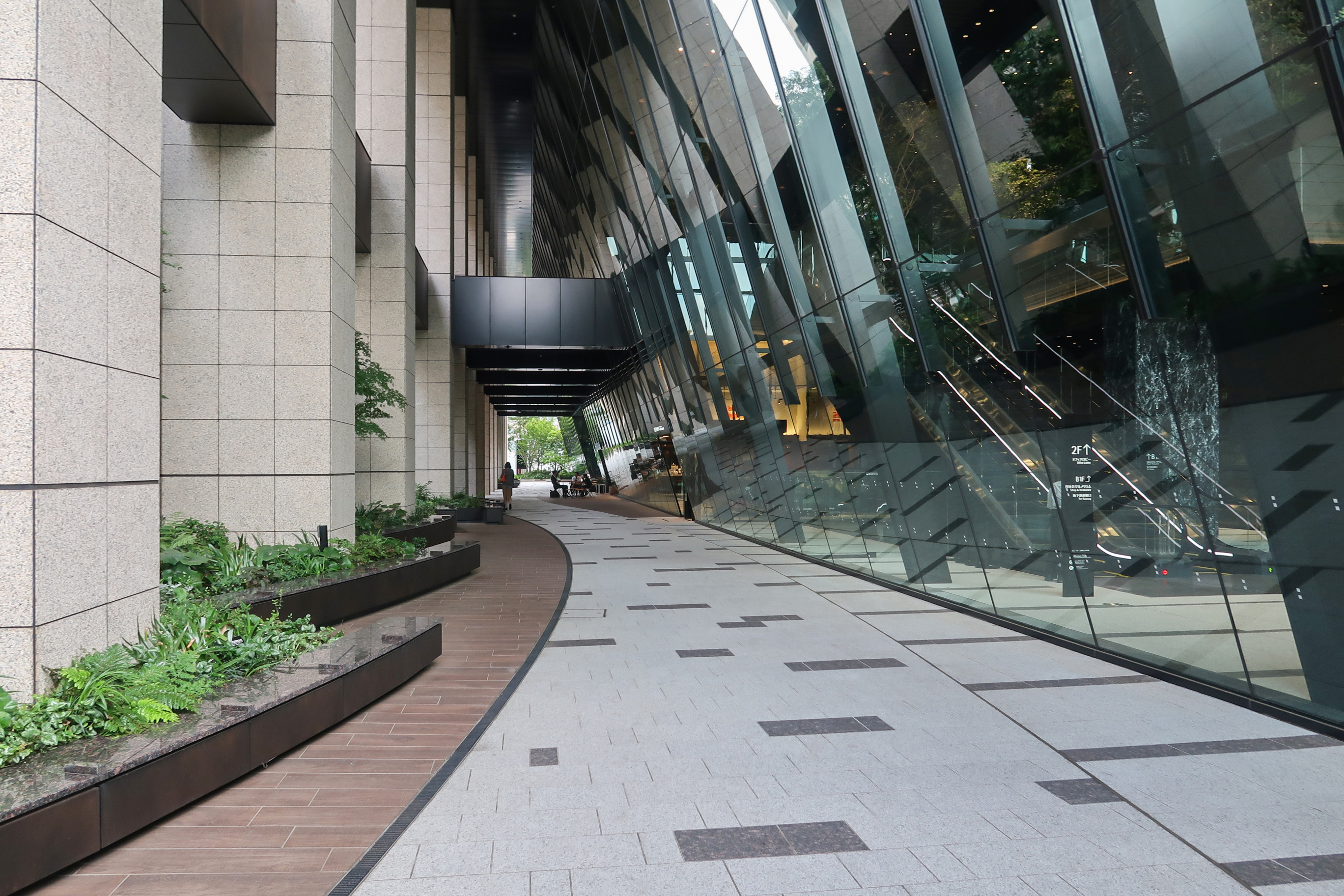 Hibiya Park Front